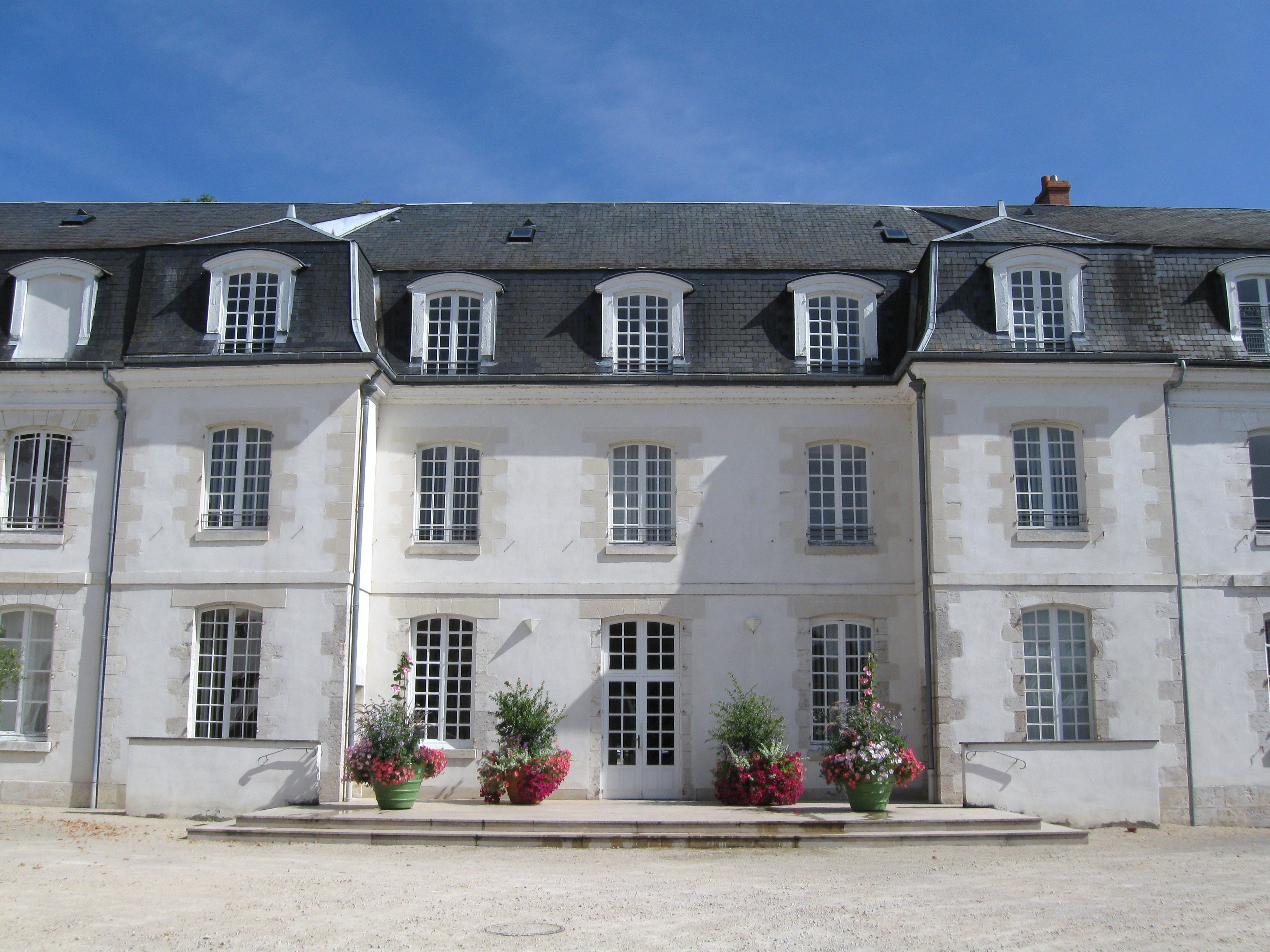 Mairie de La Chapelle-Saint-Mesmin, Loiret, France